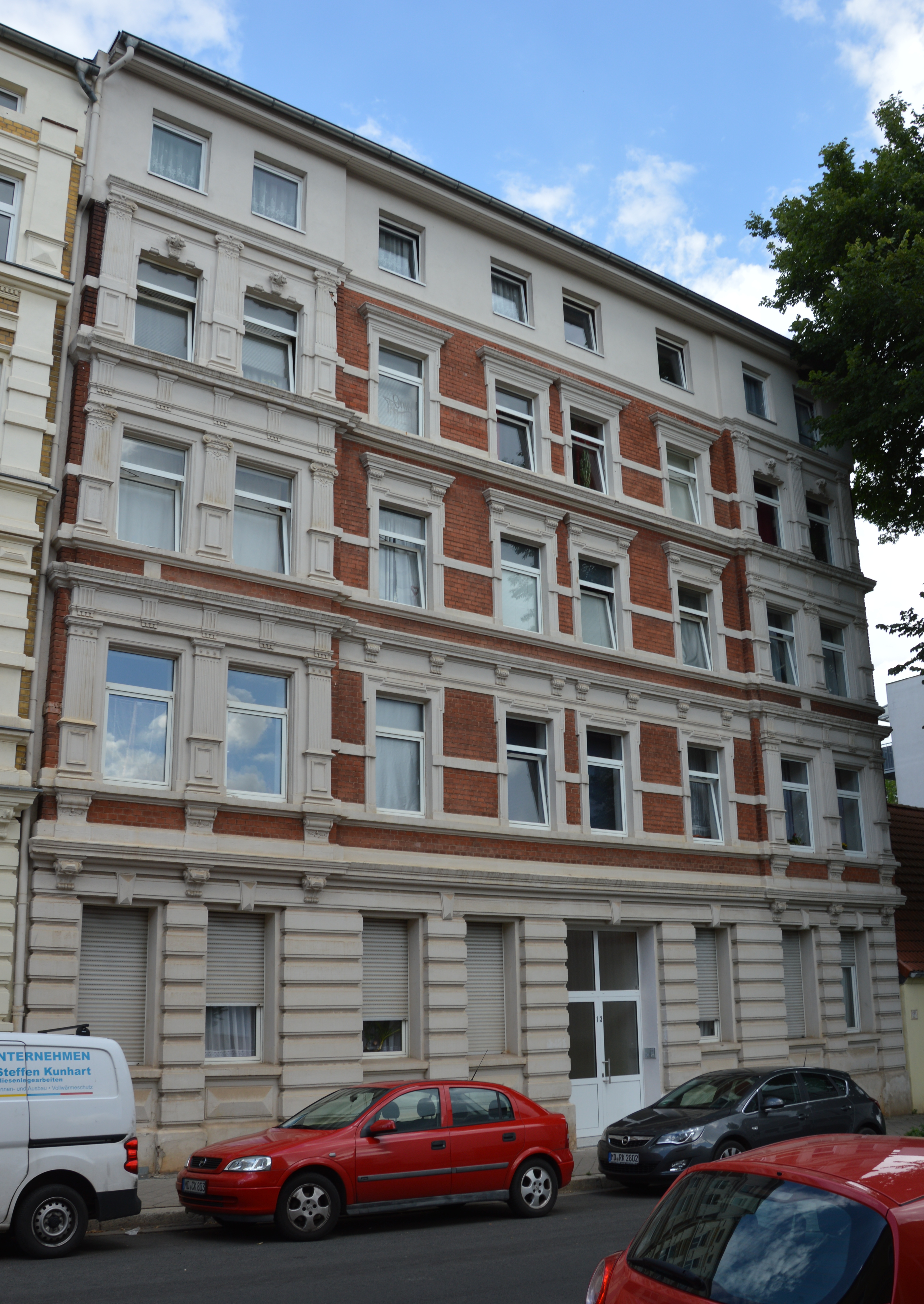 Wohnhaus St.-Michael-Straße 13 in Magdeburg